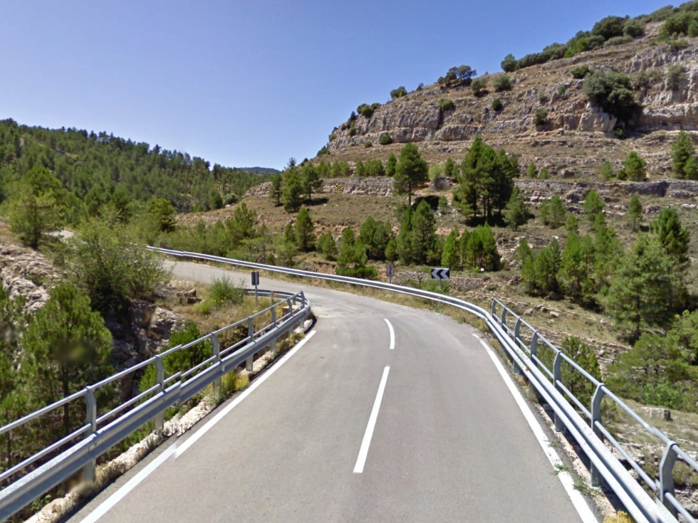 Imagen de la carretera CV-170 en Castellón, España